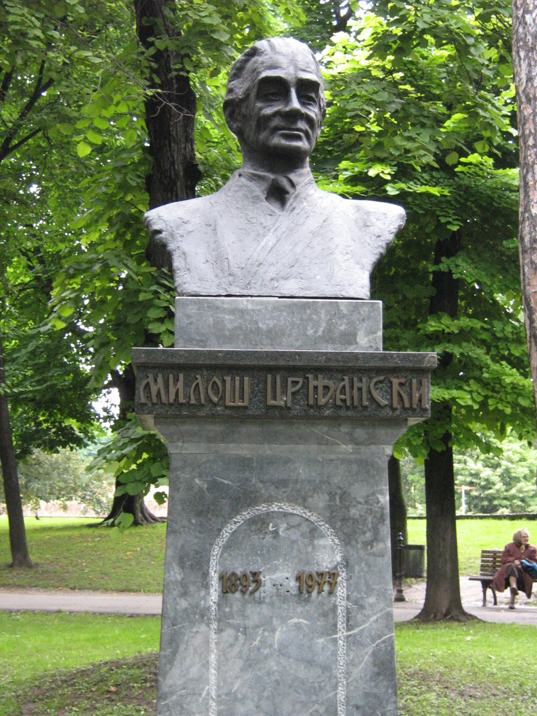 Биста Црњанског на Калемегдану. Сликано једног облачног дана. Ја аутор. Дао у јавно власништво. Licensing